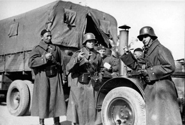 Kuchnia polowa 10 bkzmot.